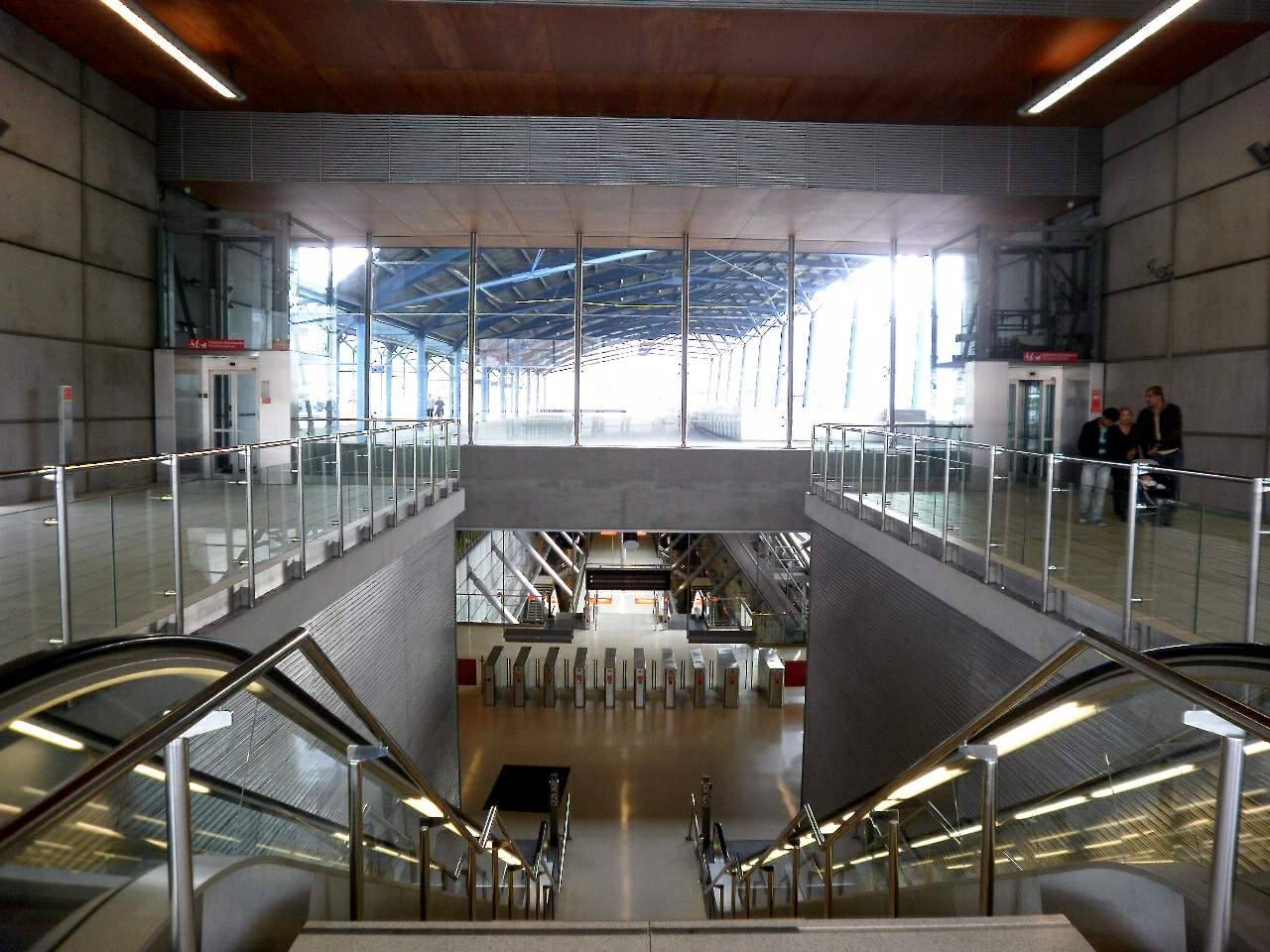 Estacion de Metro de Ansio (Barakaldo)